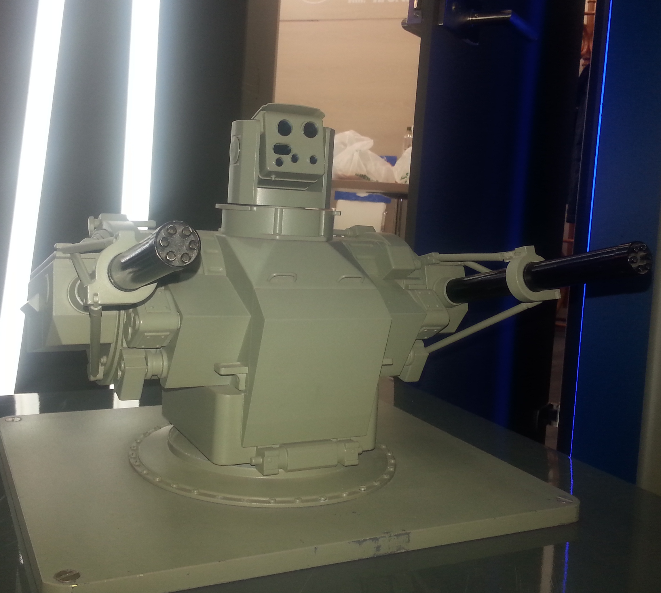 Модель ЗРАК Палаш в пушечном варианте на выставке «Армия 2016»